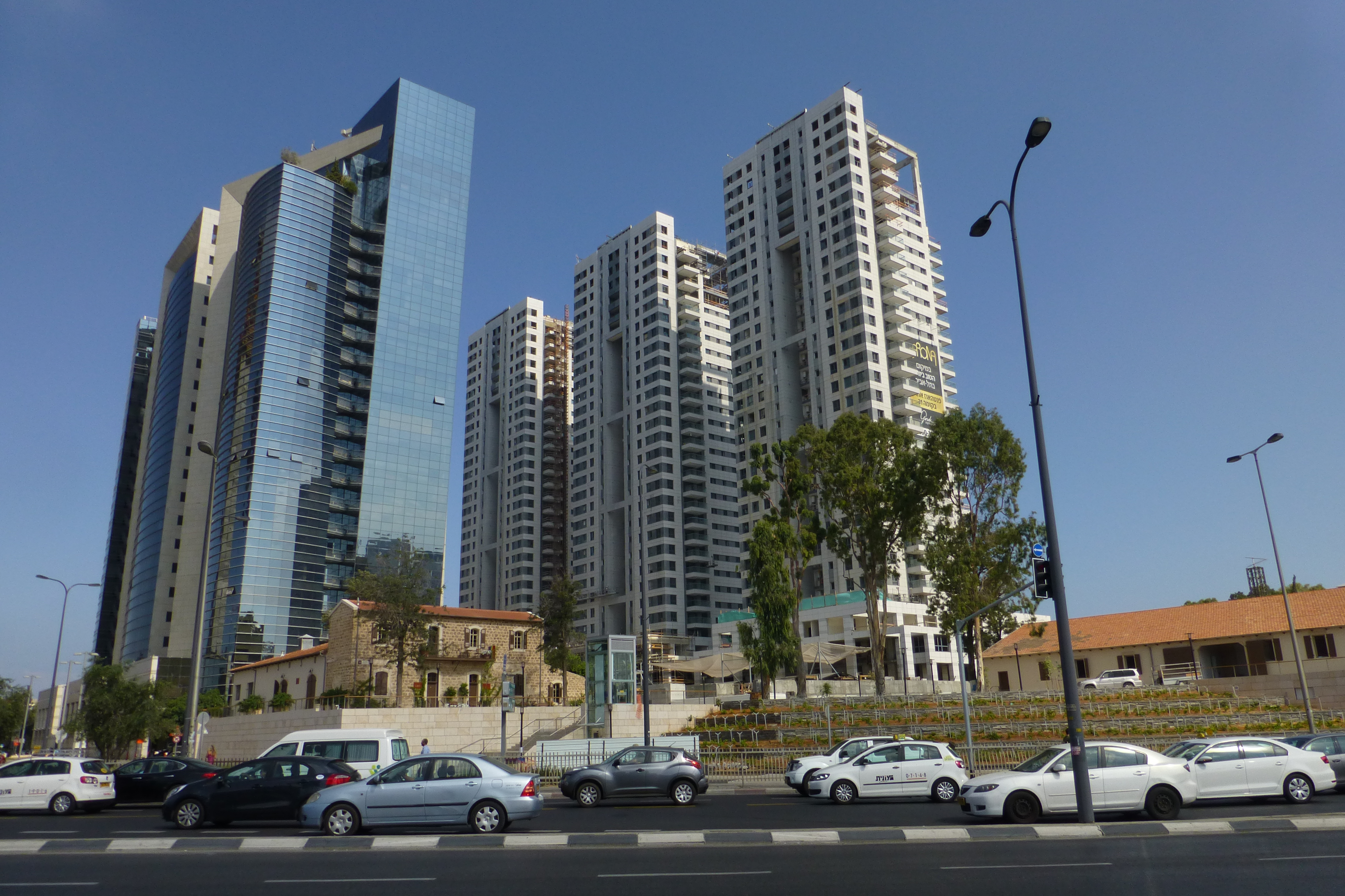 שׂרונה היא המושבה הרביעית שהקימו הגרמנים הטמפלרים בארץ ישראל במחצית השנייה של המאה ה-19. המושבה הוקמה ארבעה קילומטרים צפונית ליפו, ואחרוני בתיה שוכנים כיום בתל אביב בין שדרות שאול המלך מצפון, דרך בגין במזרח, רחוב הארבעה מדרום, ומגרשי החנייה של אחוזות החוף ממערב. מקצתם נמצאים היום בתוך בסיס הקריה.